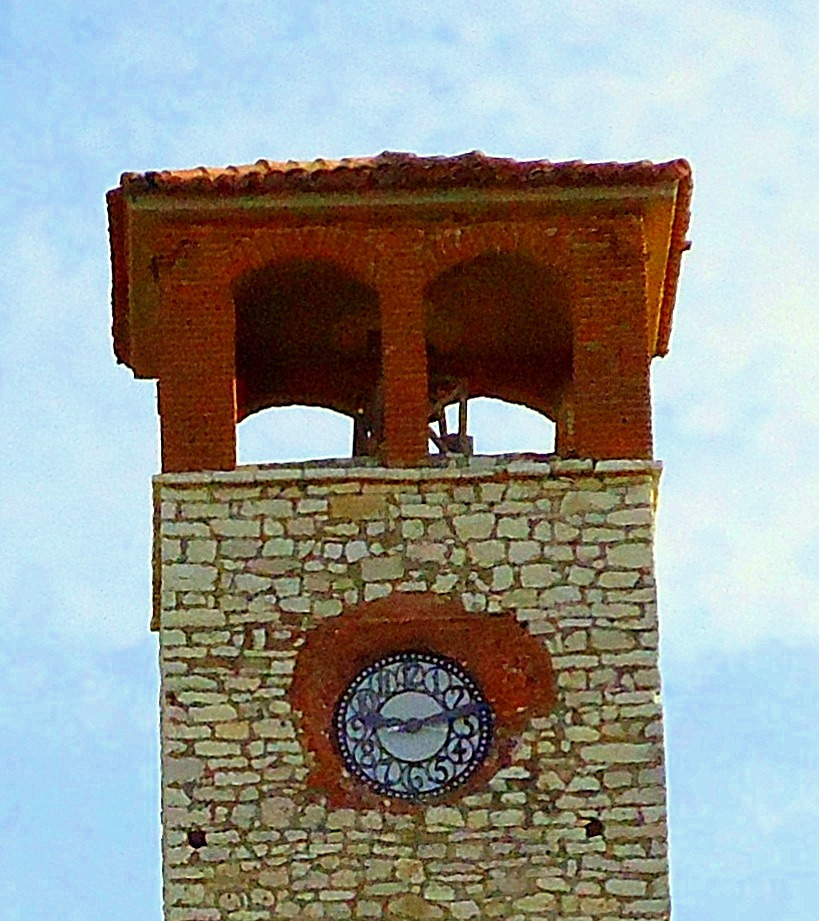 Πύργος ρολογιού, Άρτα, Ελλάδα.